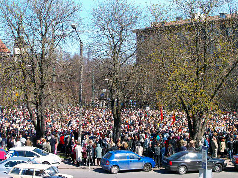 У Бронзового солдата 9 мая 2005 года (Таллин)